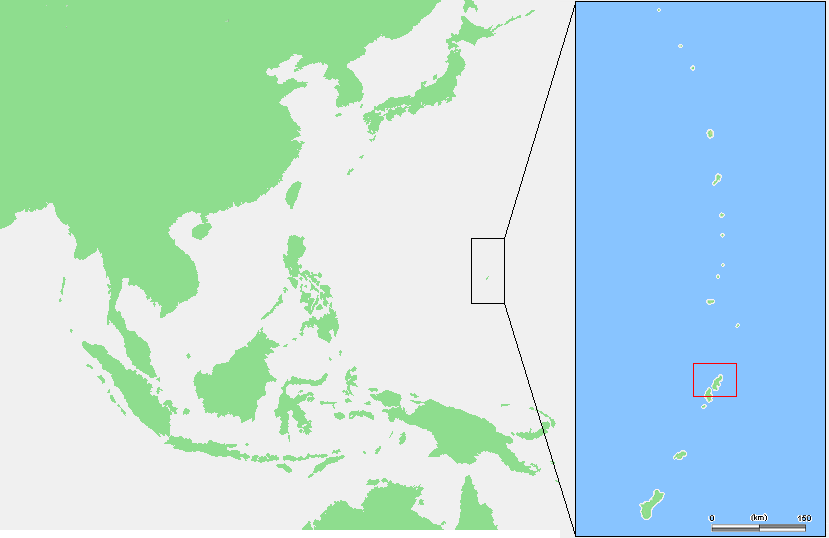 Mariana Islands - Saipan.PNG